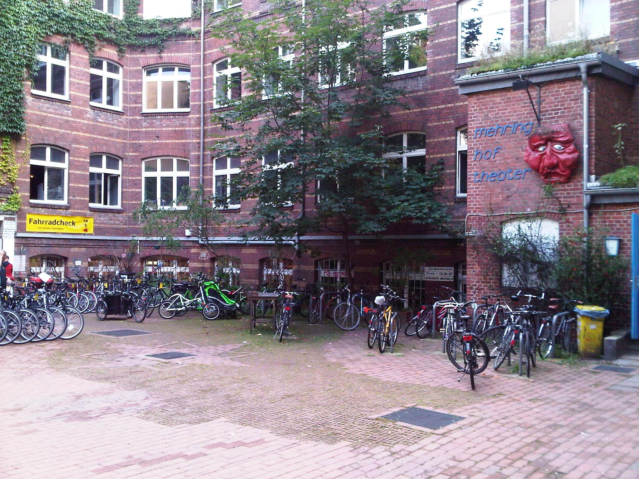 Mehringhof in Berlin-Kreuzberg. Das Foto zeigt den zweiten Hof mit dem Eingang zum Mehringhoftheater